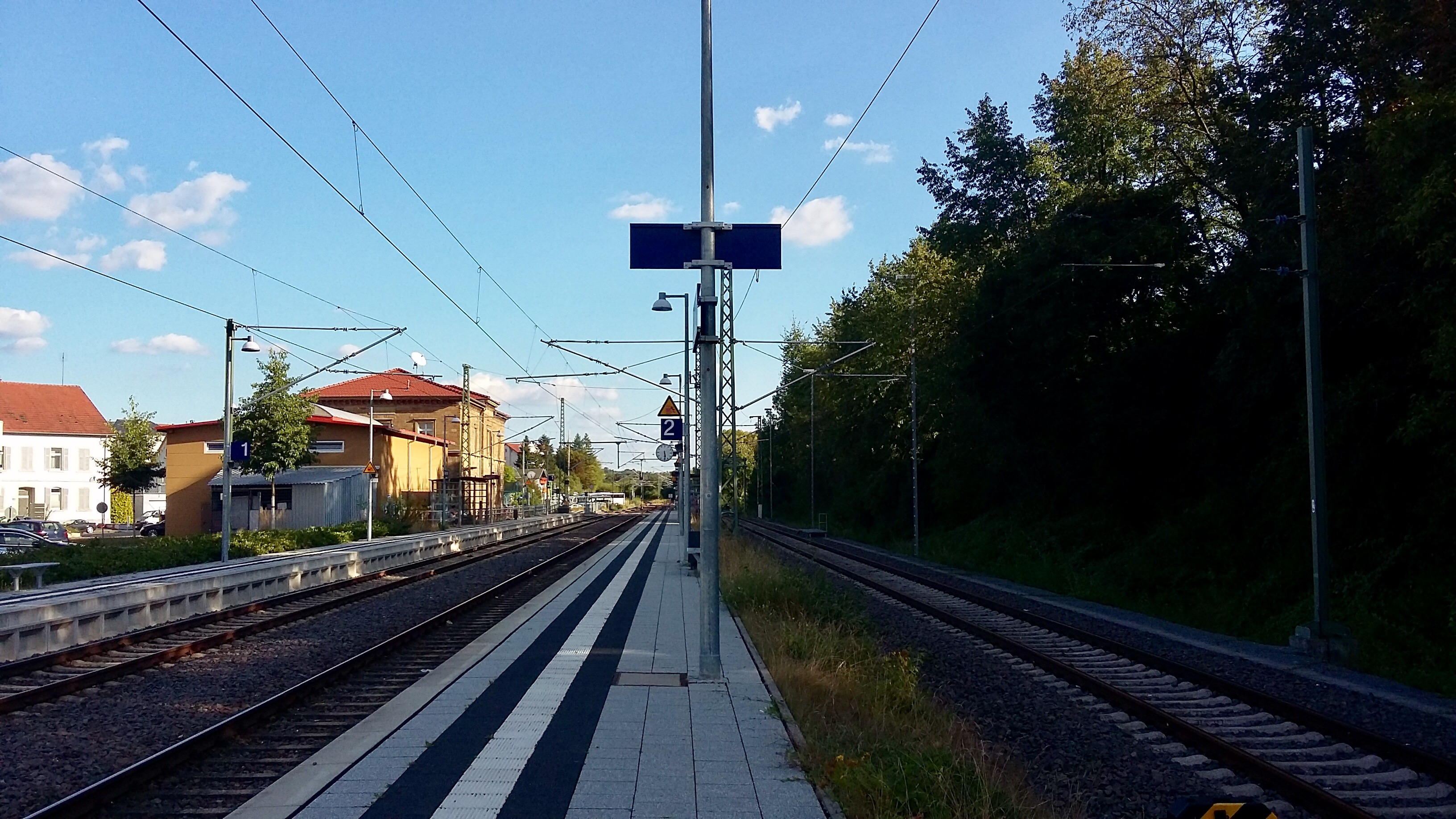 Blick über alle Bahnsteige und Gleise des Bahnhofs Steinsfurt.